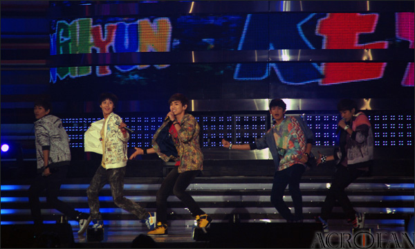 농심 협찬 제9회 '2008 사랑나눔콘서트'